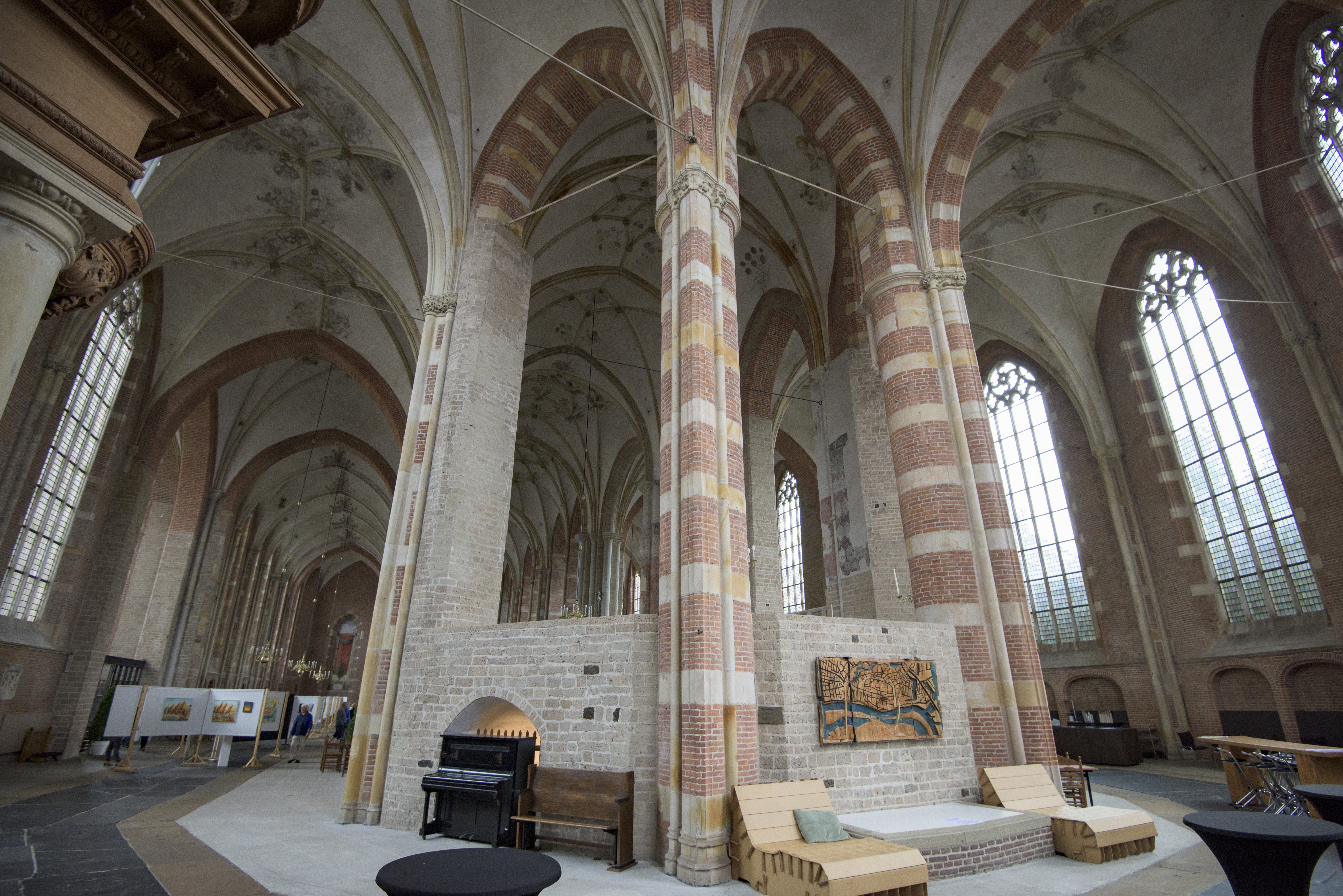 Interieur van de Grote of Lebuïnuskerk te Deventer.